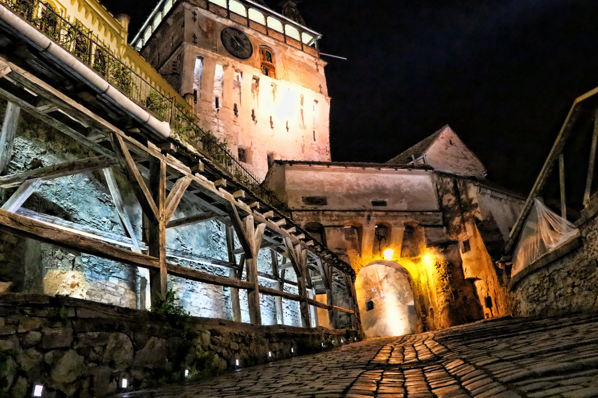 Ansamblu fortificații: intrarea fortificată, Turnul cu Ceas, Turnul Tăbăcarilor, Turnul Cositorarilor, Turnul Frânghierilor, Turnul Măcelarilor și Bastionul Castaldo, Turnul Cojocarilor, Turnul Croitorilor, Turnul Cizmarilor, Turnul fierarilor, curtinele